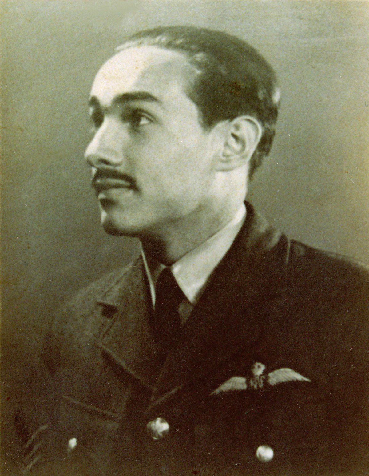 Czeslaw Oberdak, poolse piloot